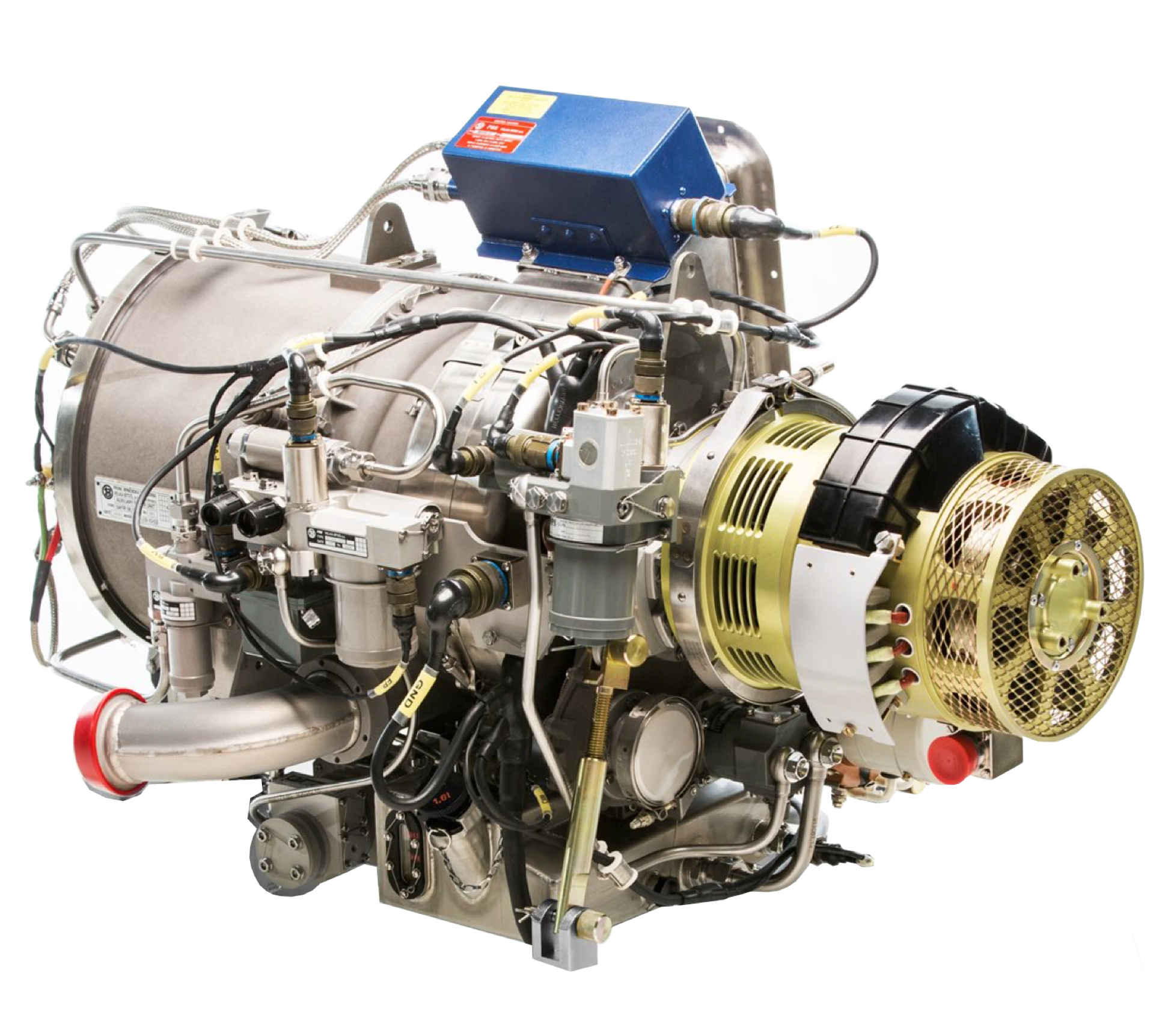 APU Safir 5KG MI